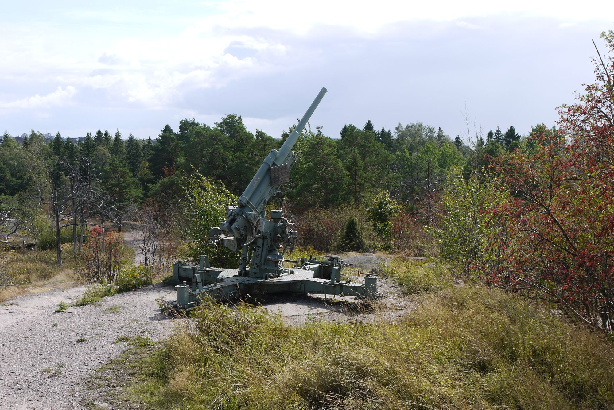 Lauttasaaren ilmapuolustuksen muistomerkiksi pystytetty 76 ItK 31 Myllykalliolla